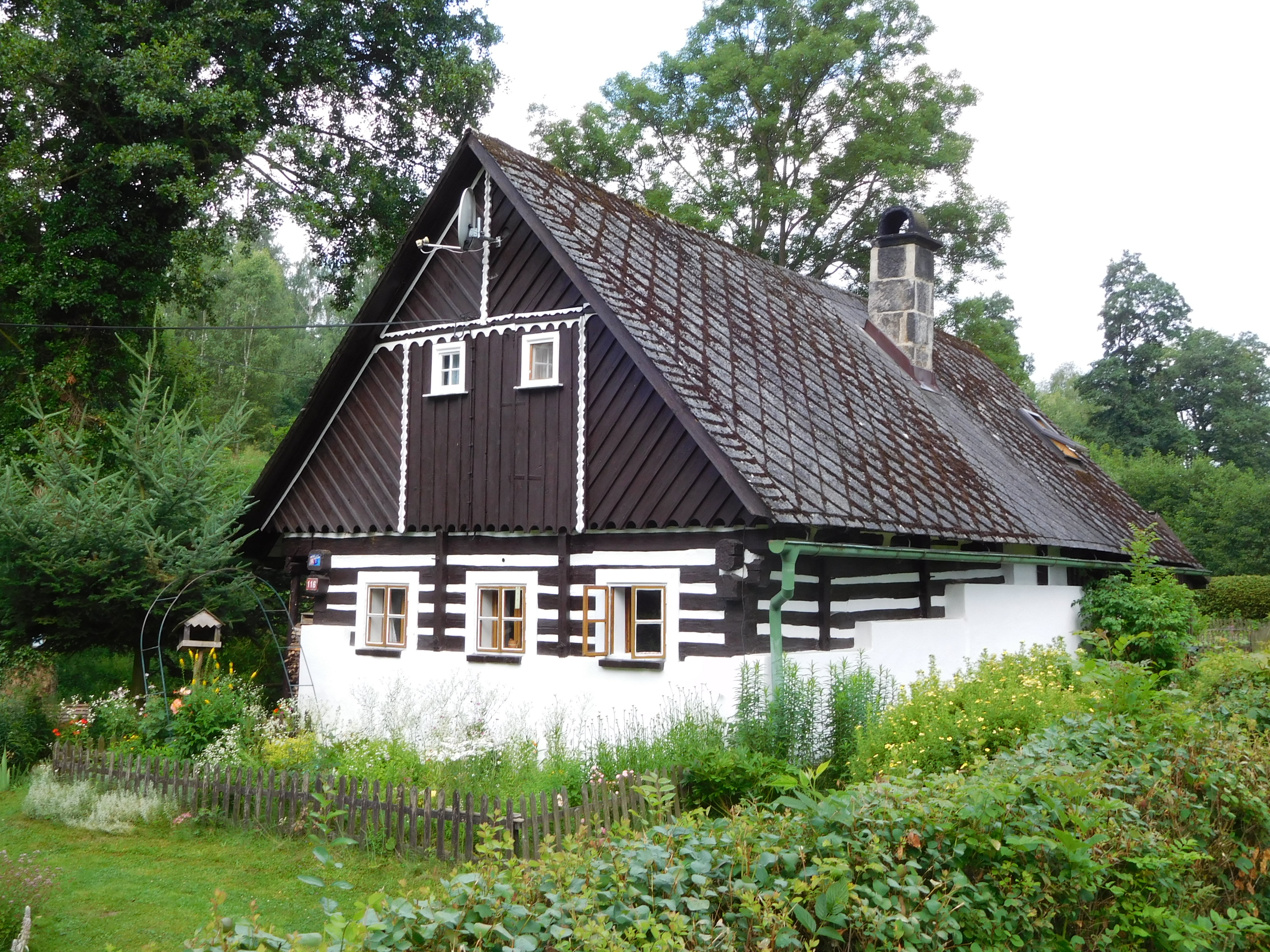 Horní Brusnice - dům č.p. 116